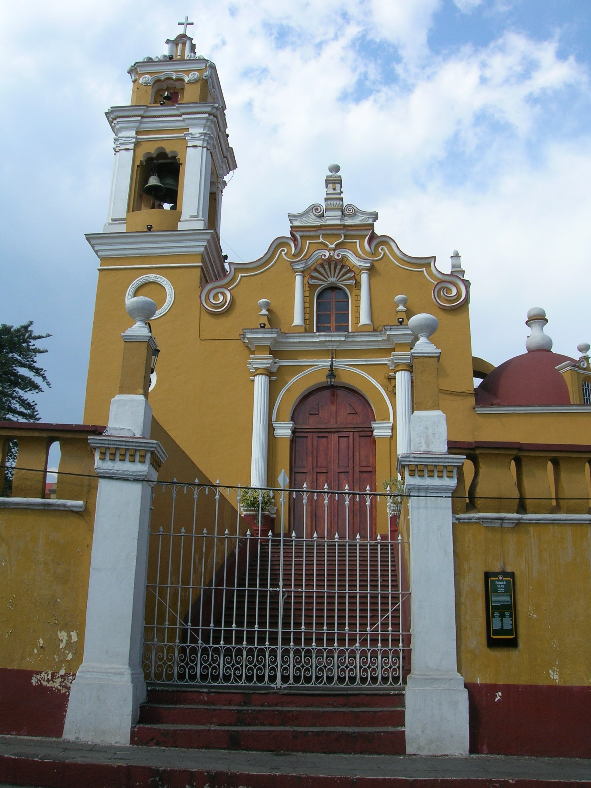 Parroquia de San José, Xalapa, Veracruz